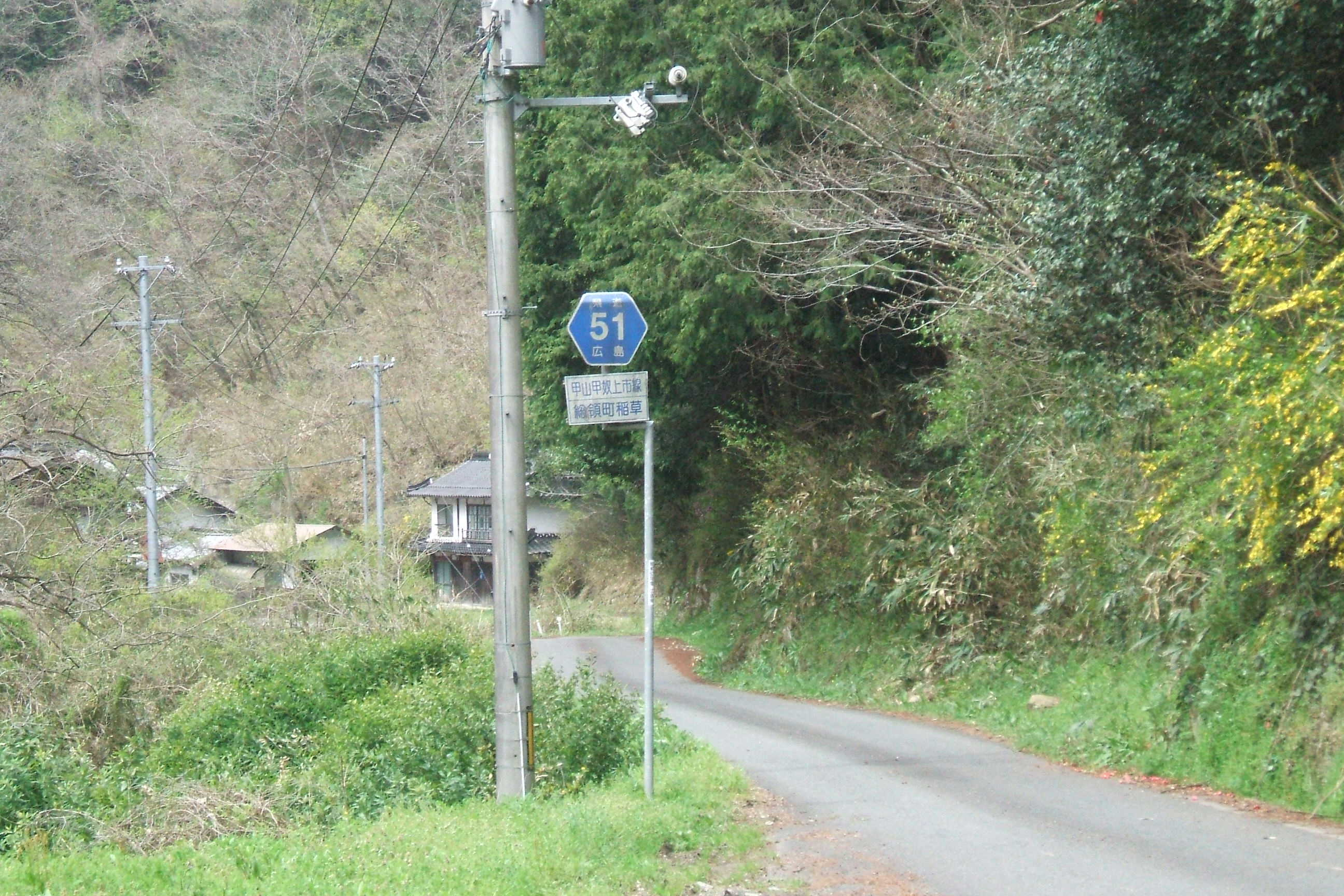 広島県庄原市総領町稲草にある広島県道51号甲山甲奴上市線の標識